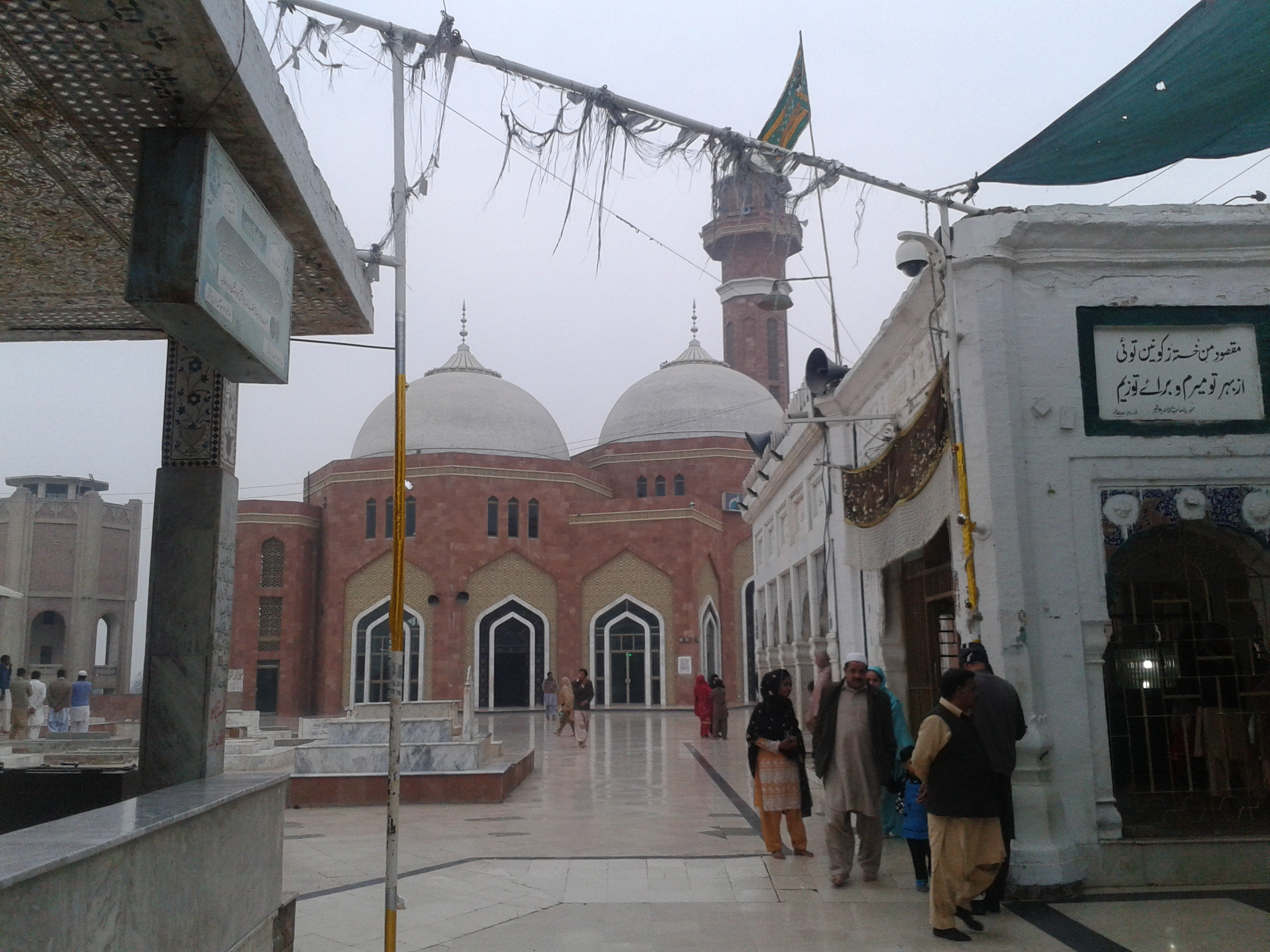 Mosque at Darbar Hazrat Baba Farid ud Deen Ganj Shakar Rahmatullah Alaih